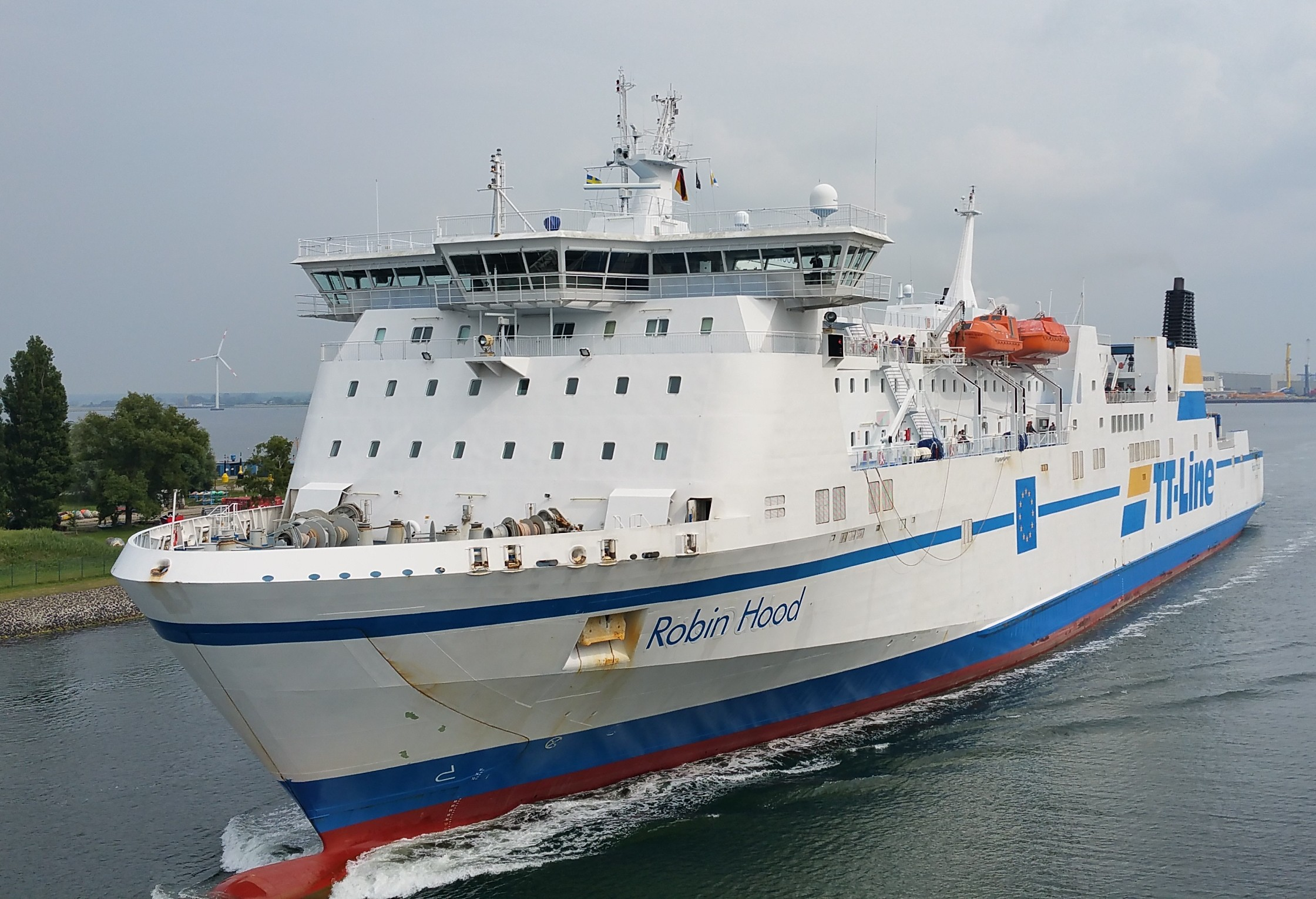 Fähre Robin Hood Bugansicht, Rostock